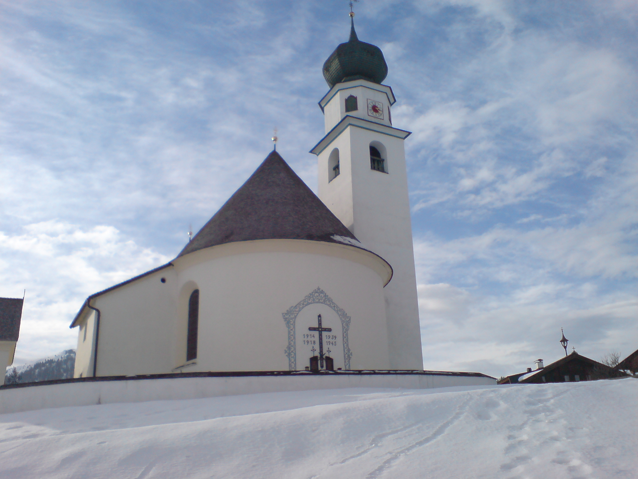 Kirche Thierbach